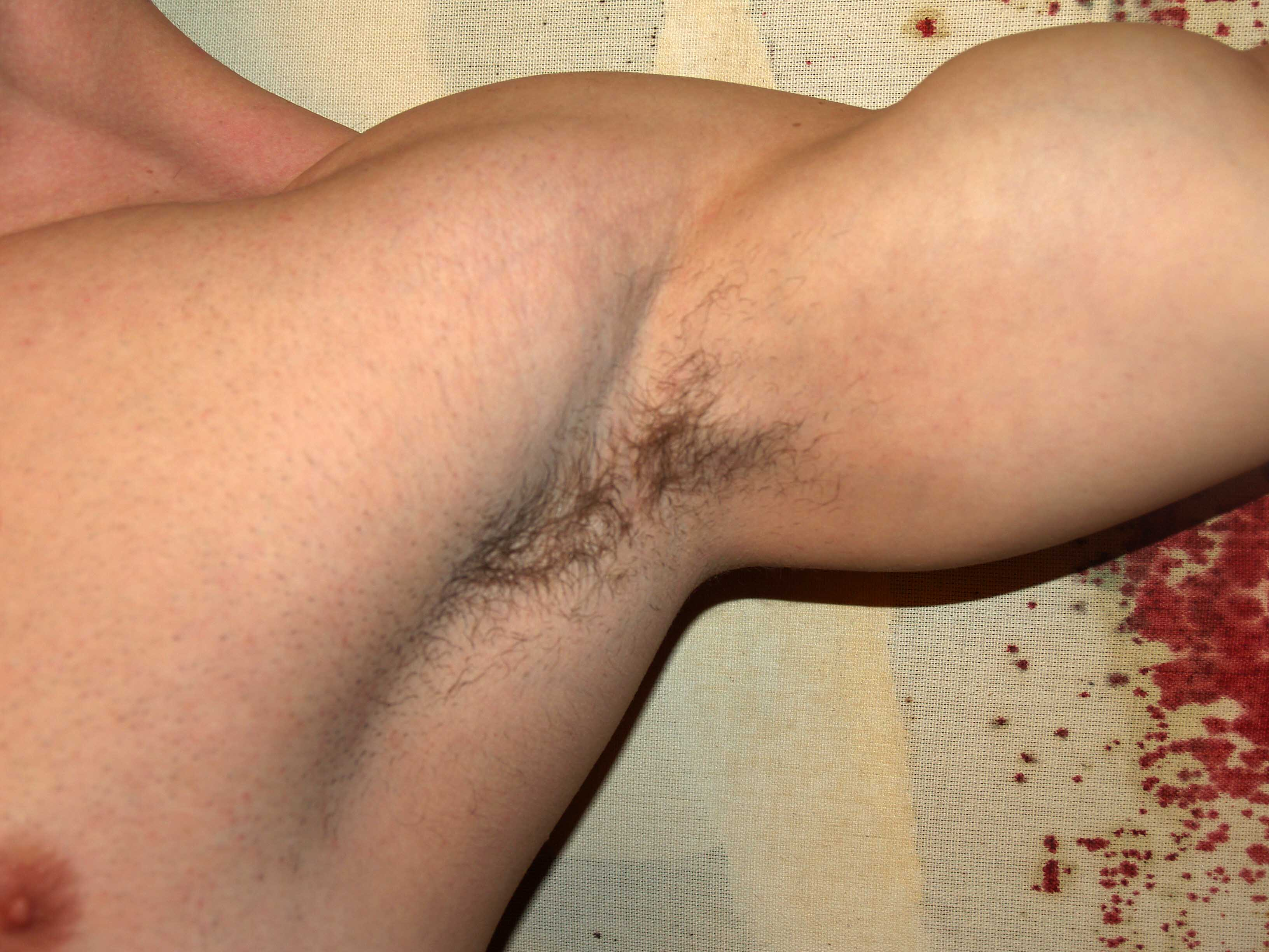 Armpit